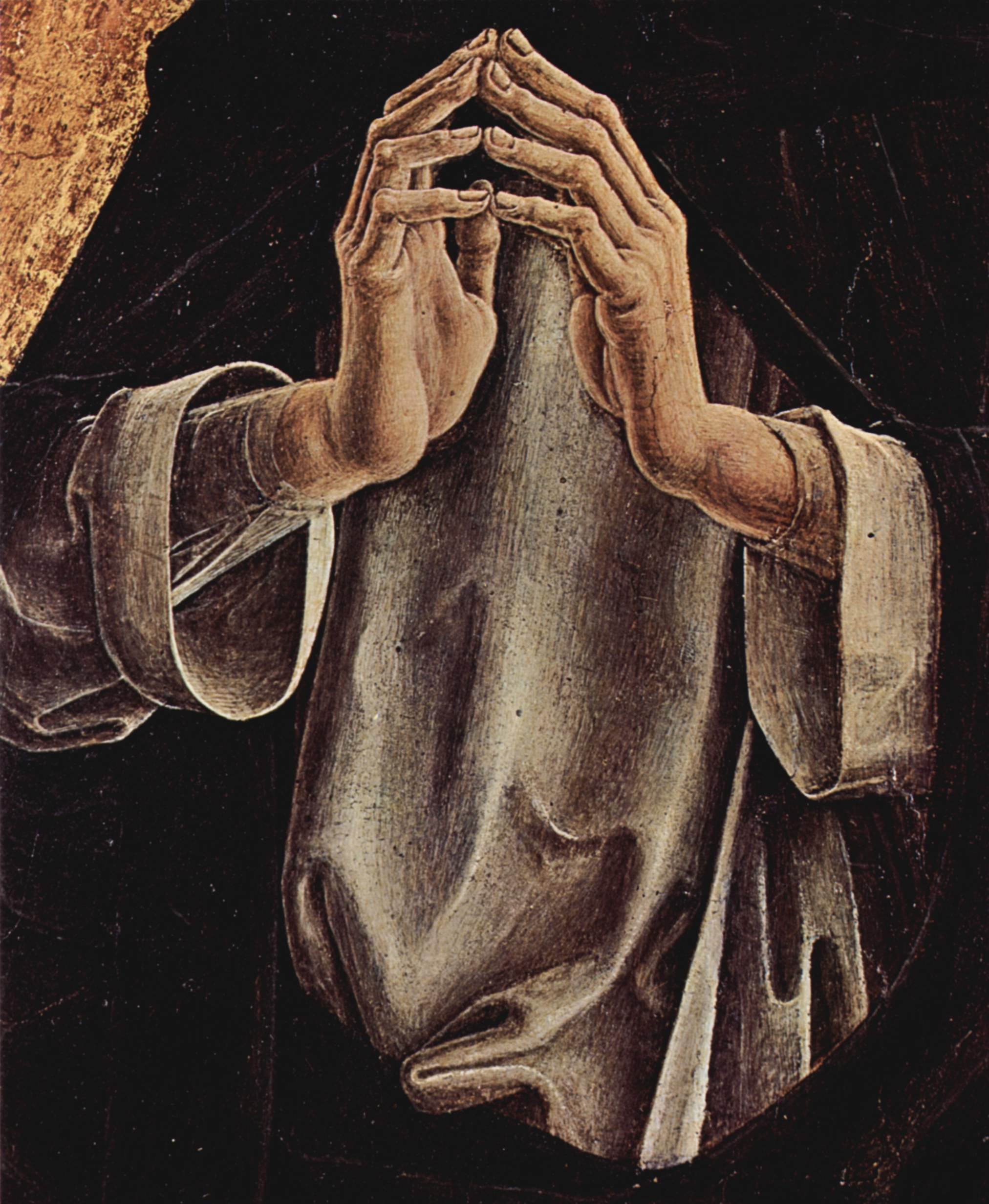 detail